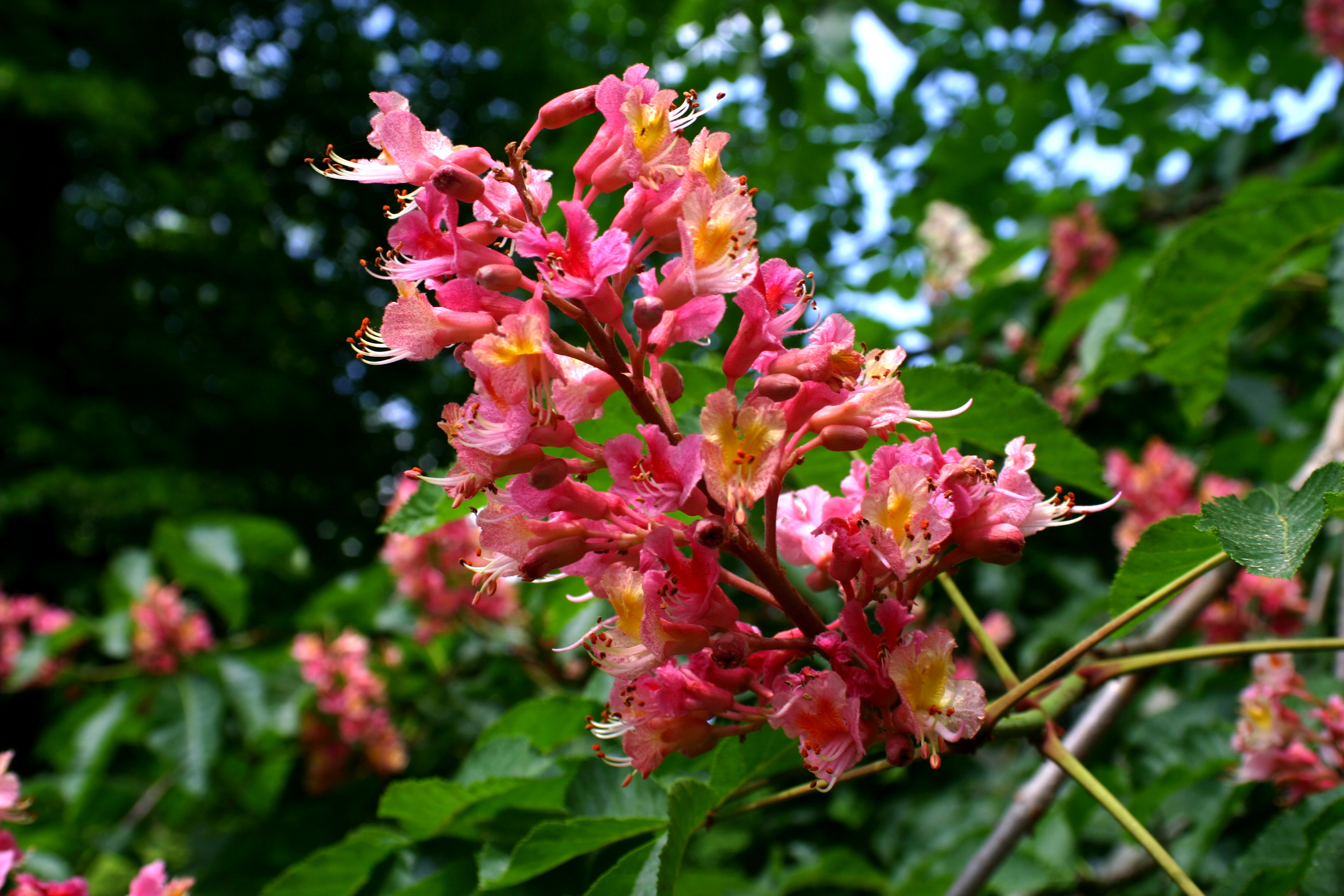 Blüte einer Purpurkastanie im Botanischen Garten der Westfälischen Wilhelms-Universität Münster (Aesculus carnea)